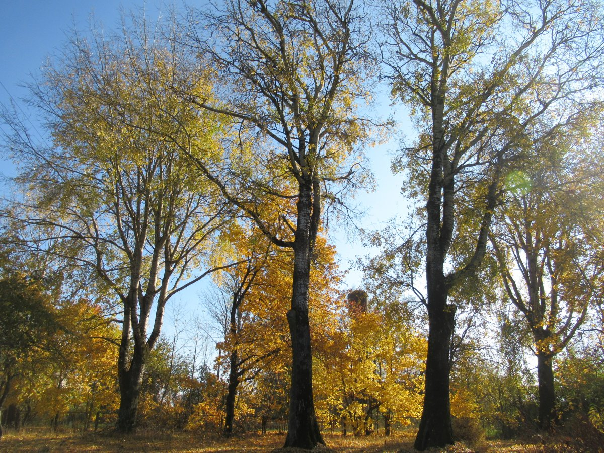 Каранеўшчына (Клецкі раён). Сядзіба Марціноўскіх. Парк